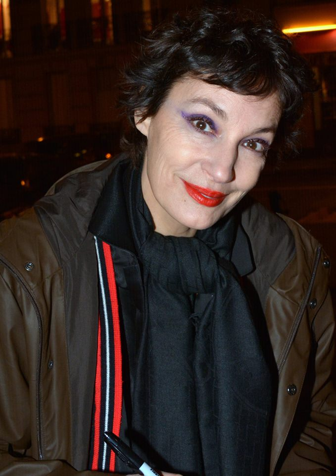 Jeanne Balibar à la cérémonie des prix Lumières